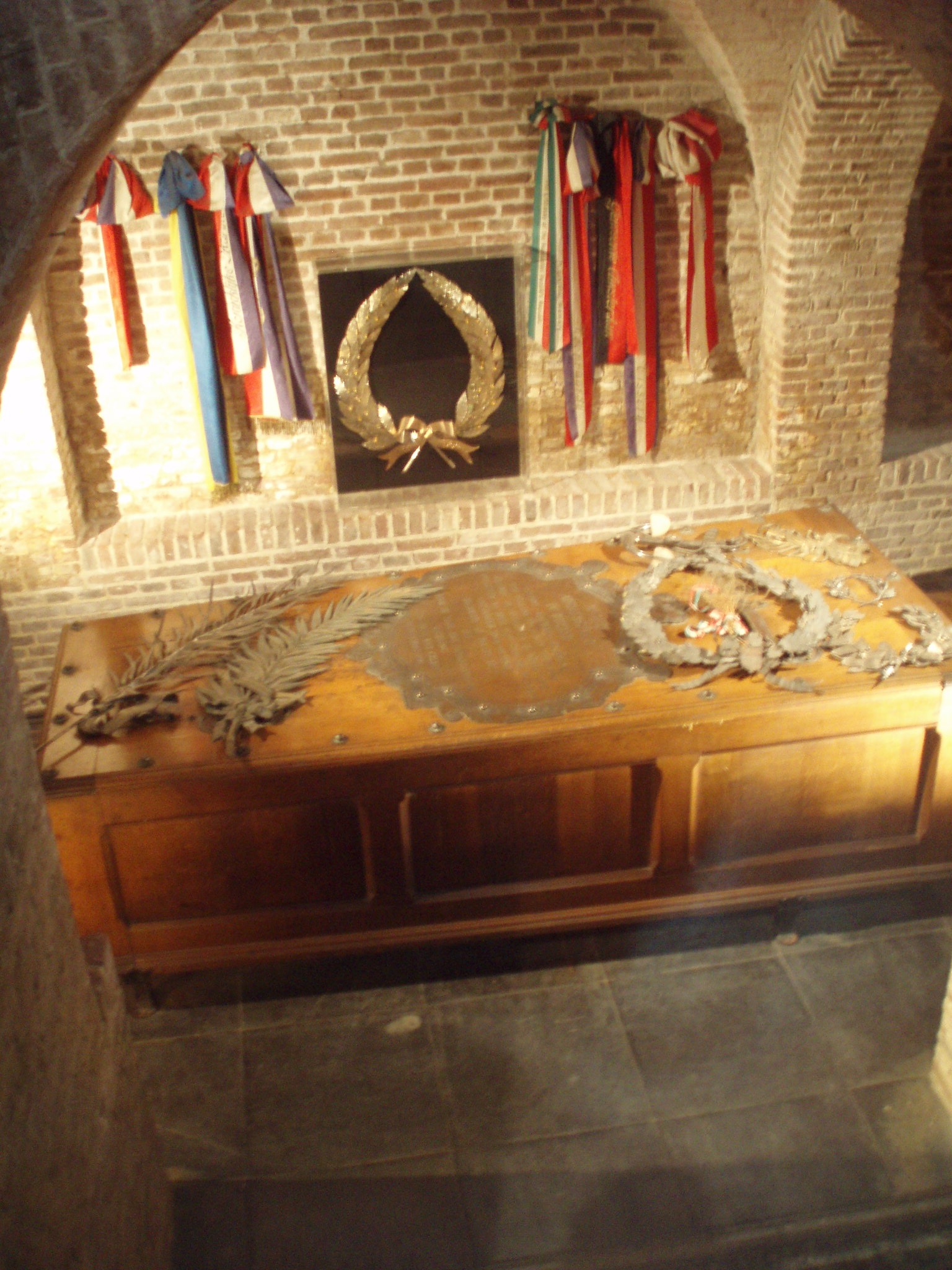 Coffin of Michiel de Ruyter, Nieuwe Kerk Amsterdam, Netherlands